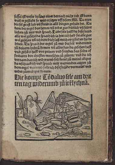 Der Engel bringt Tundalus' Seele zurück zu ihrem leblosen Körper. aus: Visio Tnugdali, gedruckt bei Matthias Hupfuff in Straßburg (1514)